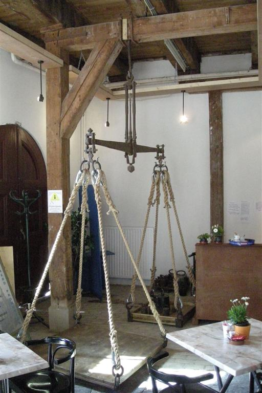 Stadhuis van Bolsward (ook waag)